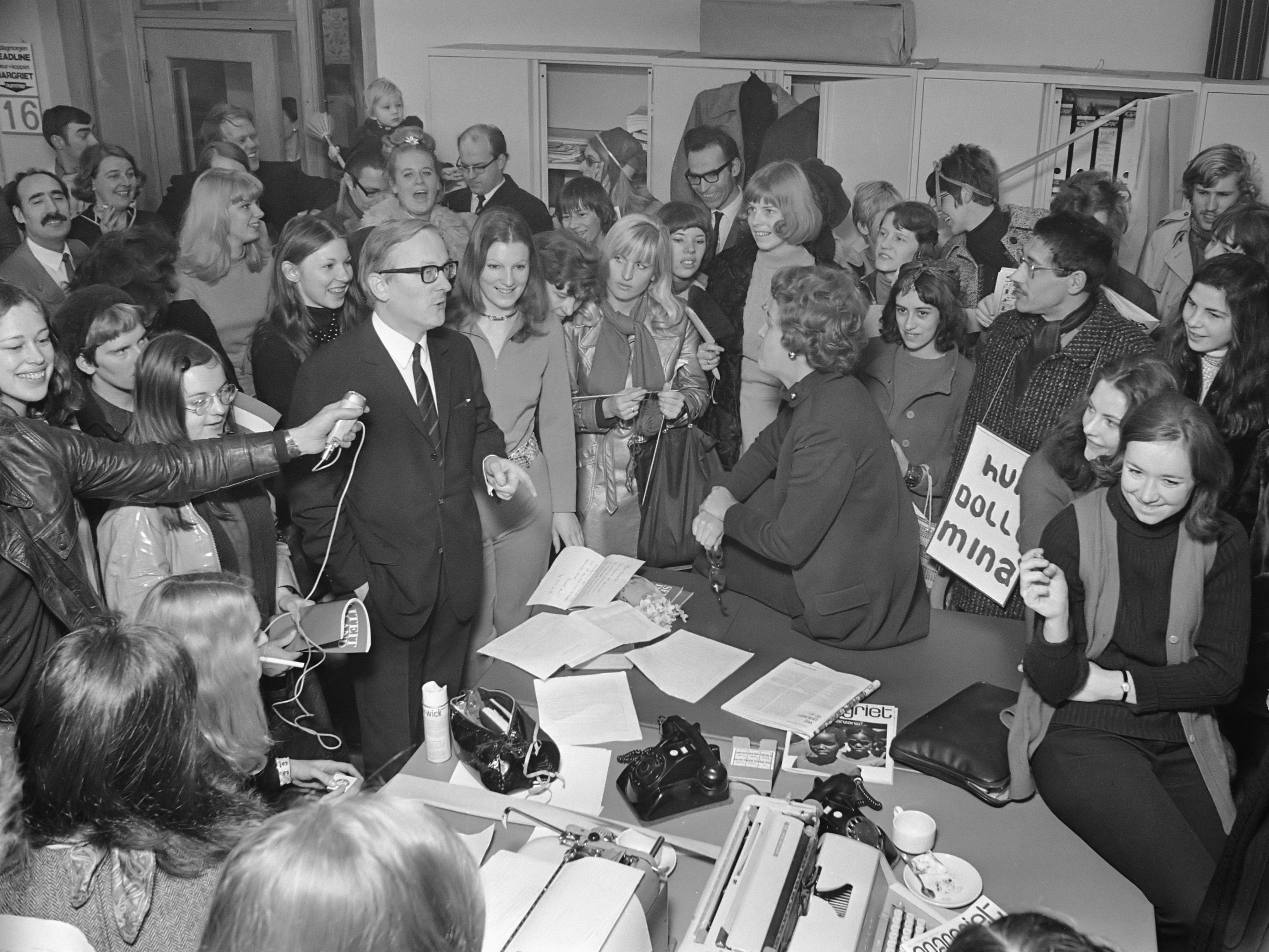 Actiegroep 'Dolle Mina' in de redactielokalen van het damesblad Margriet De Dolle Mina's zijn in discussie met directeur Te Marvelde en adjunct hoofdredacteur mevrouw Van den Horst 20 februari 1970